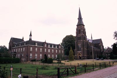 Zelf gemaakte foto